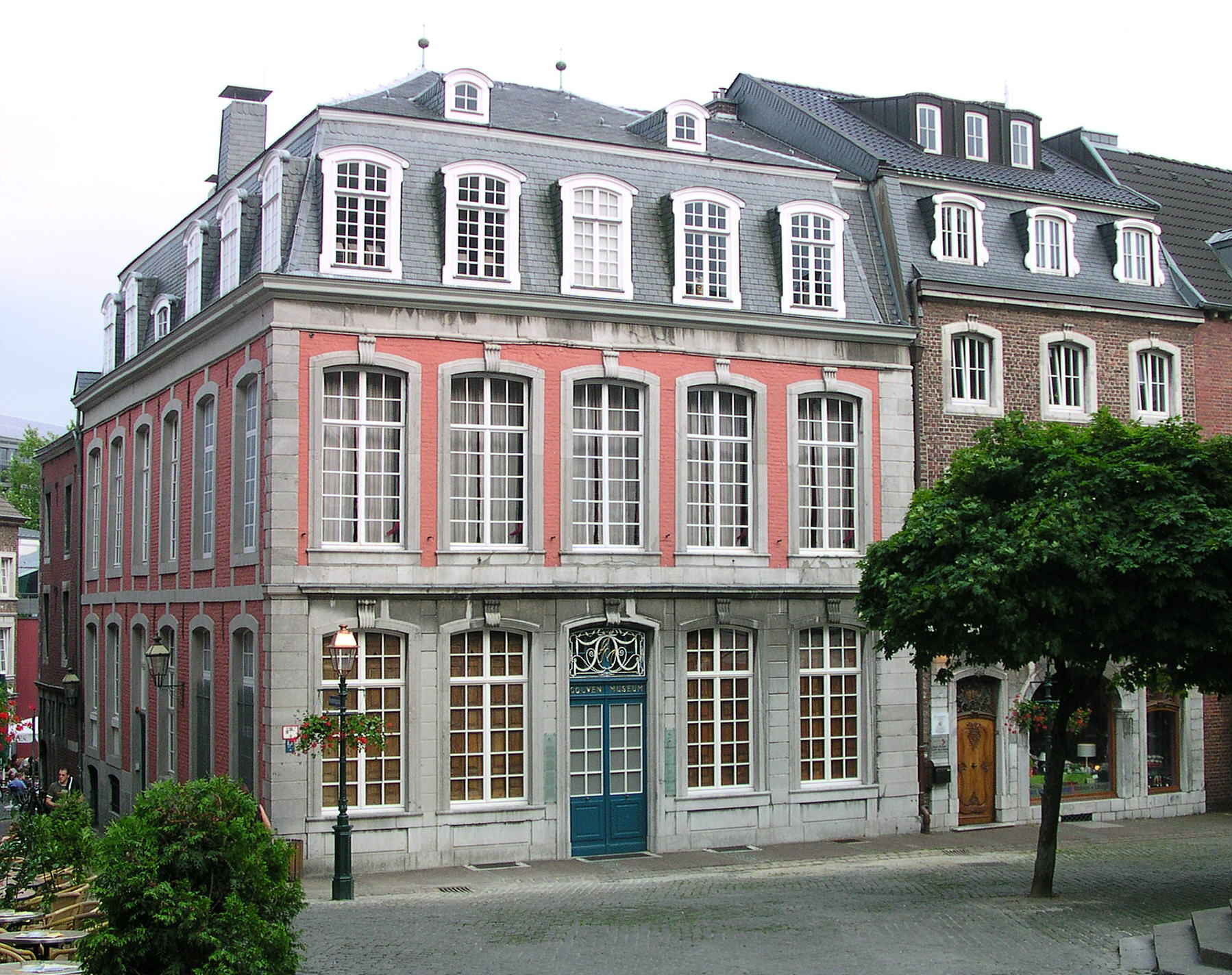 Aachen, Couvenmuseum Am Hühnermarkt 17 (linkes Gebäude), auf den Fundamenten der beim Stadtbrand von 1656 zerstörten Stadtwaage. Später errichtete der Apotheker Coebergh hier die Adlerapotheke, 1783 erwarb Andreas Monheim das Haus, das er 1786 von Jakob Couven umbauen lies.